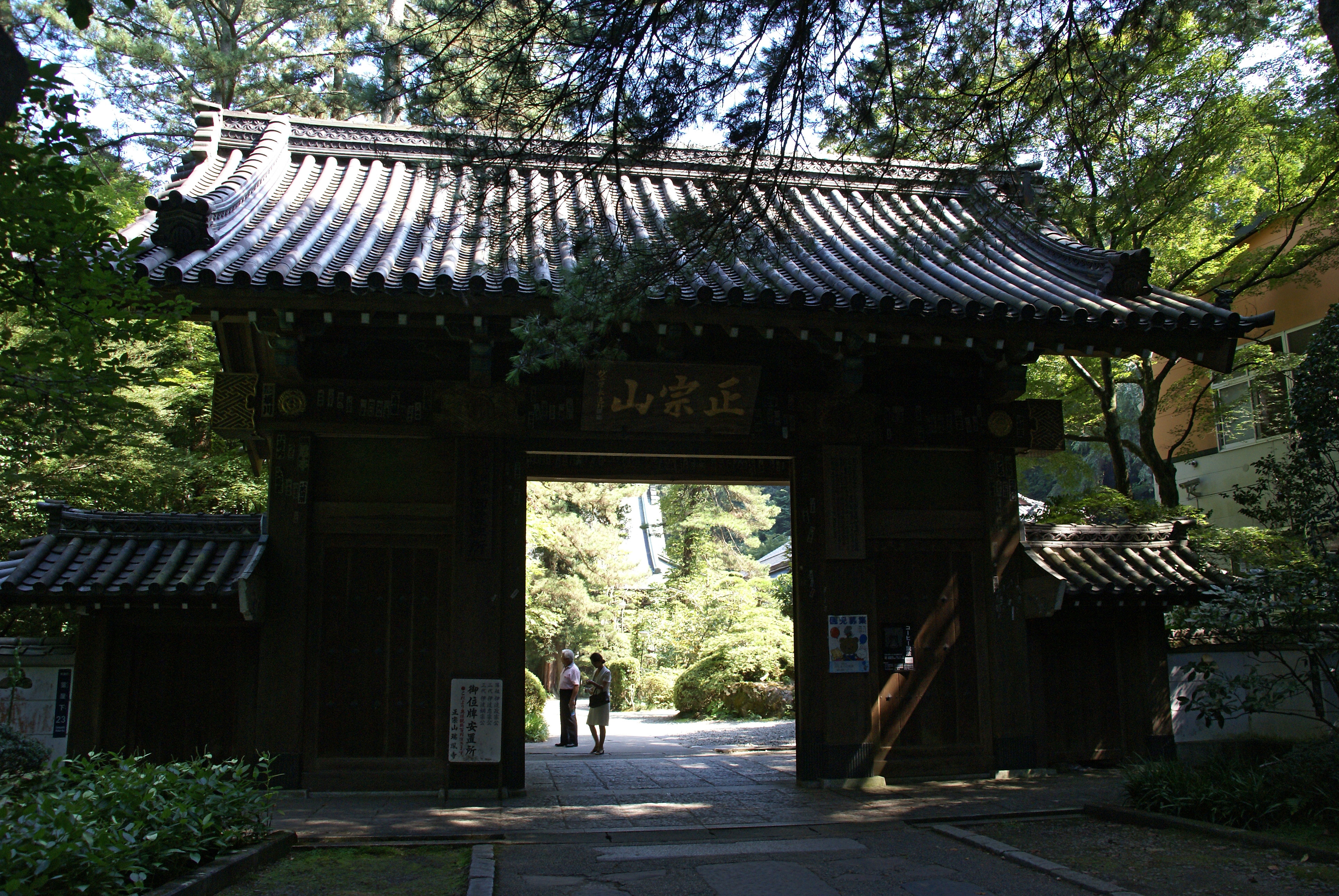 Zuiho-ji in Sendai, Miyagi prefecture, Japan